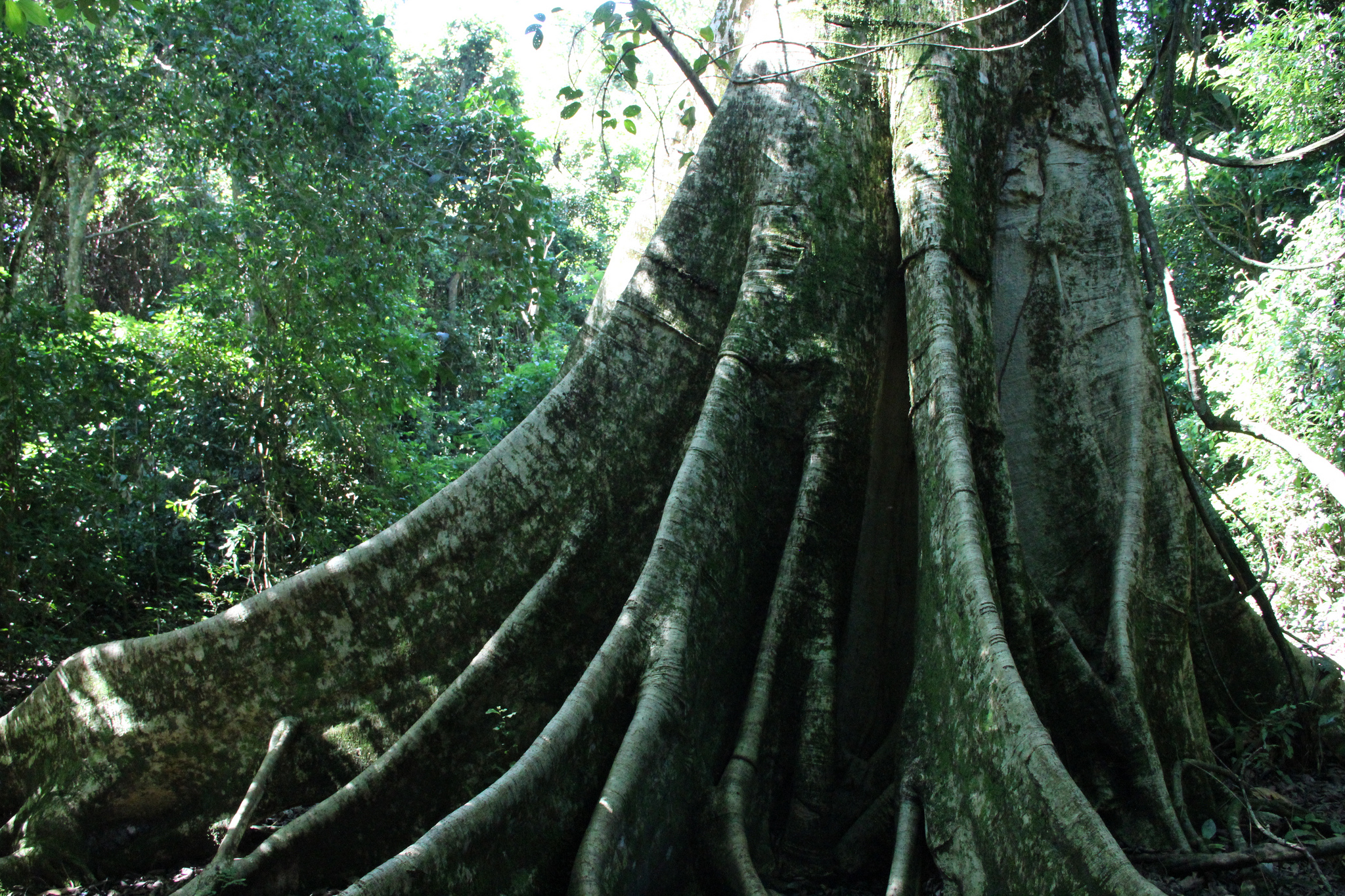 Figueira fotografada no Parque Estadual do Morro do Diabo